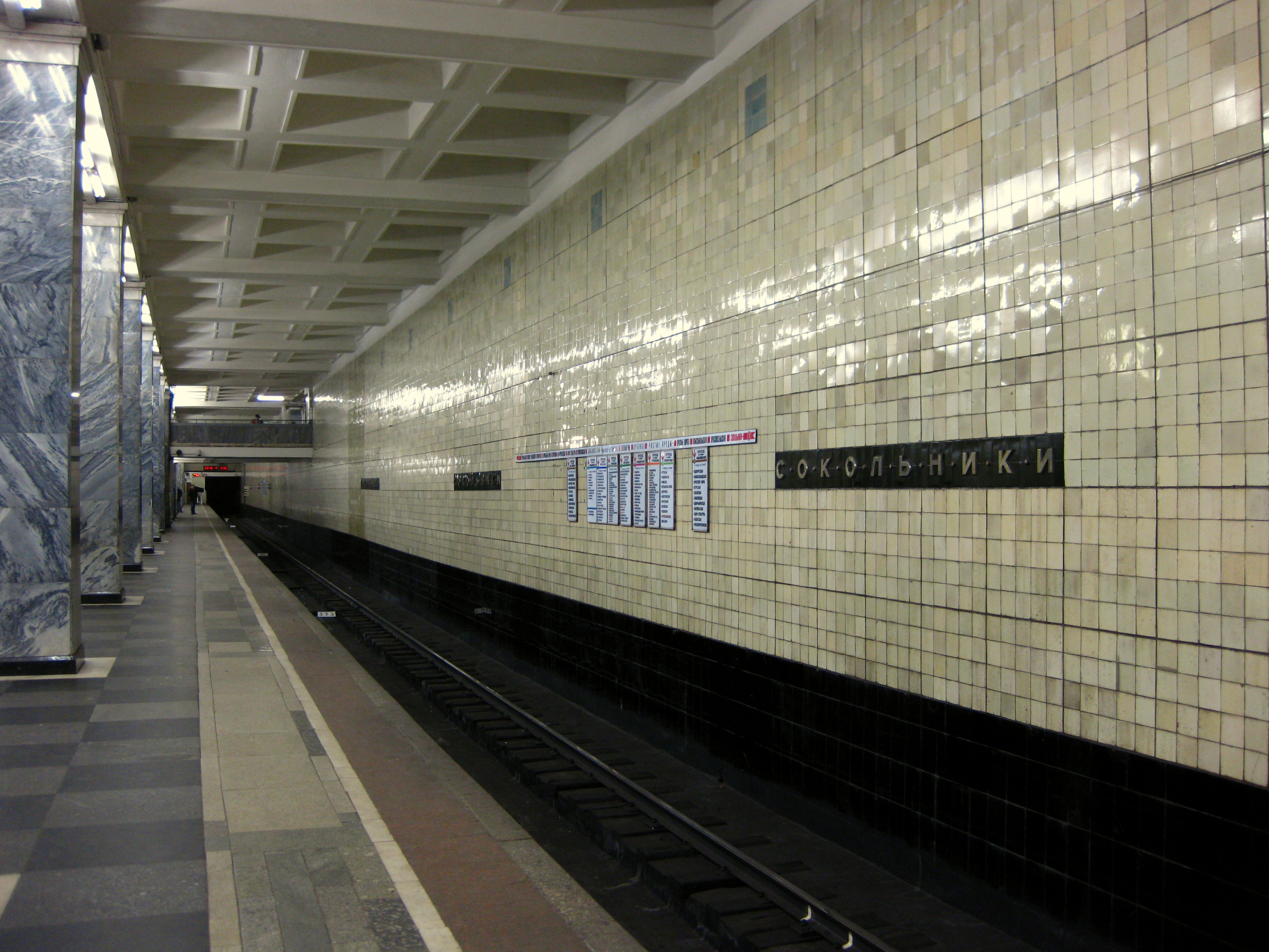 Посадочная платформа станции метро Сокольники Московского метрополитена